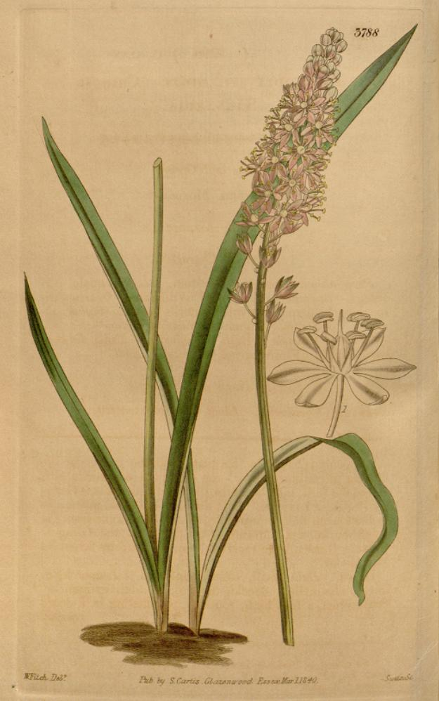 Illustration of Barnardia japonica (synonyms Scilla scilloides, Barnardia scilloides)